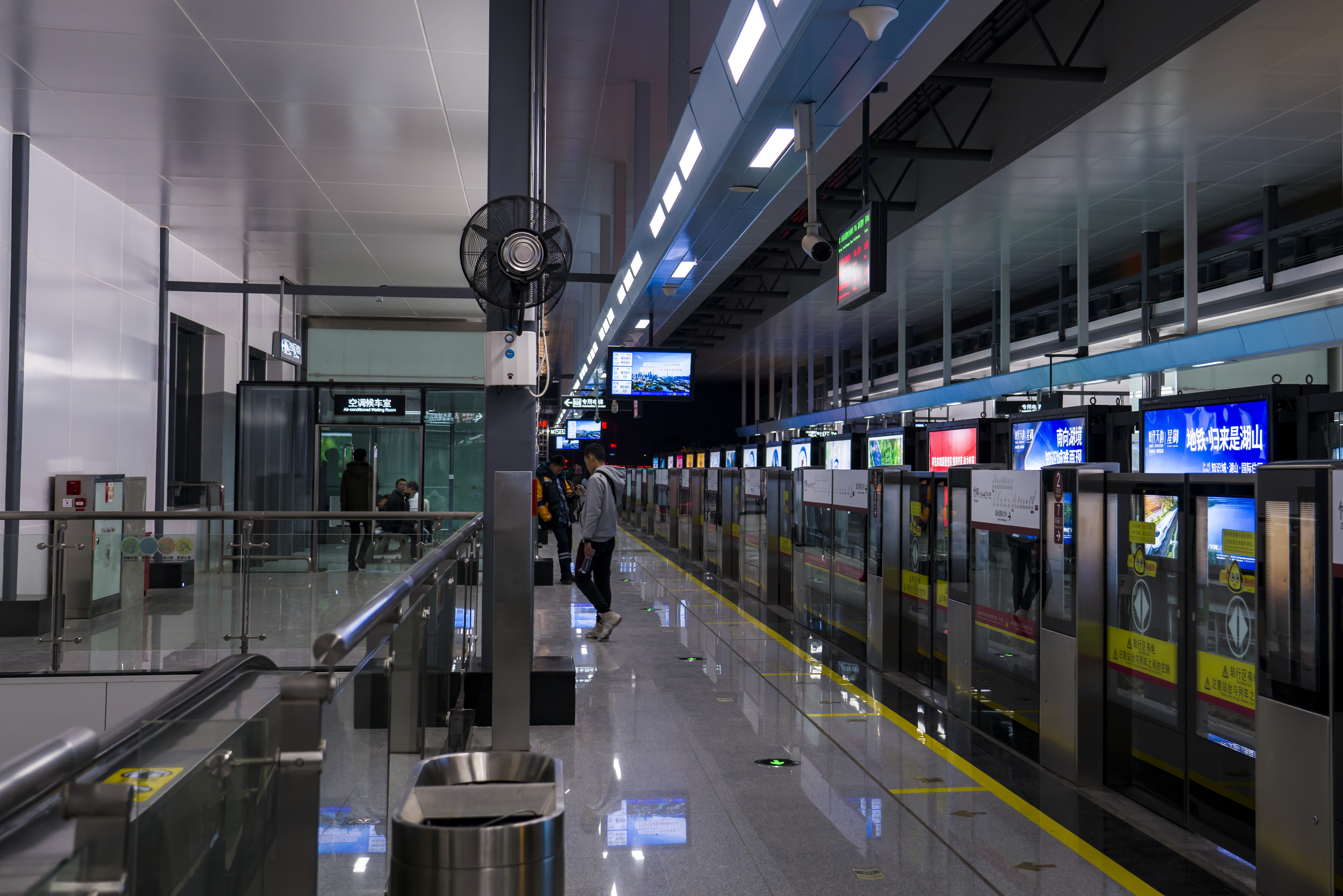 竹料站2号月台